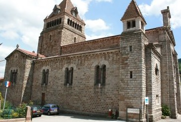 Eglise St-Blaise